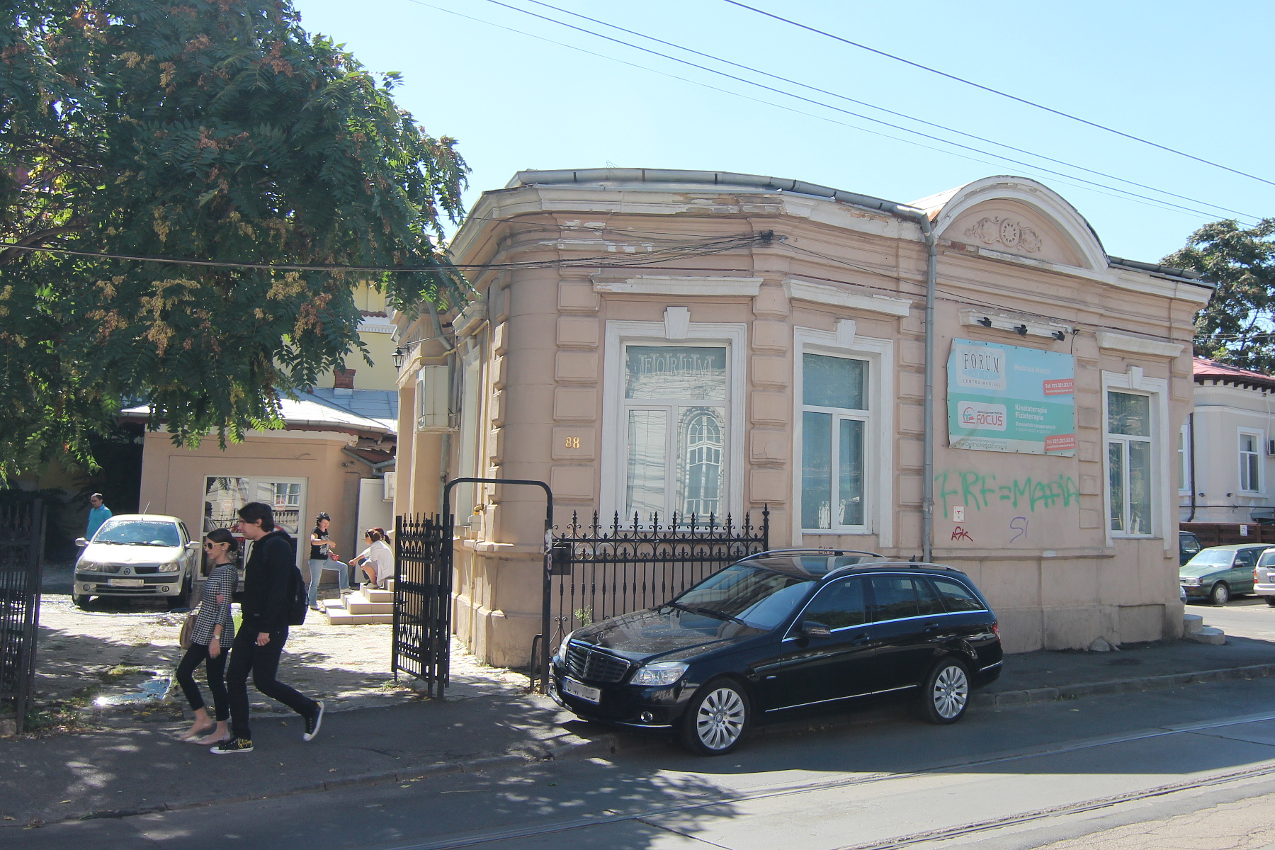 Casă pe Calea Călărașilor